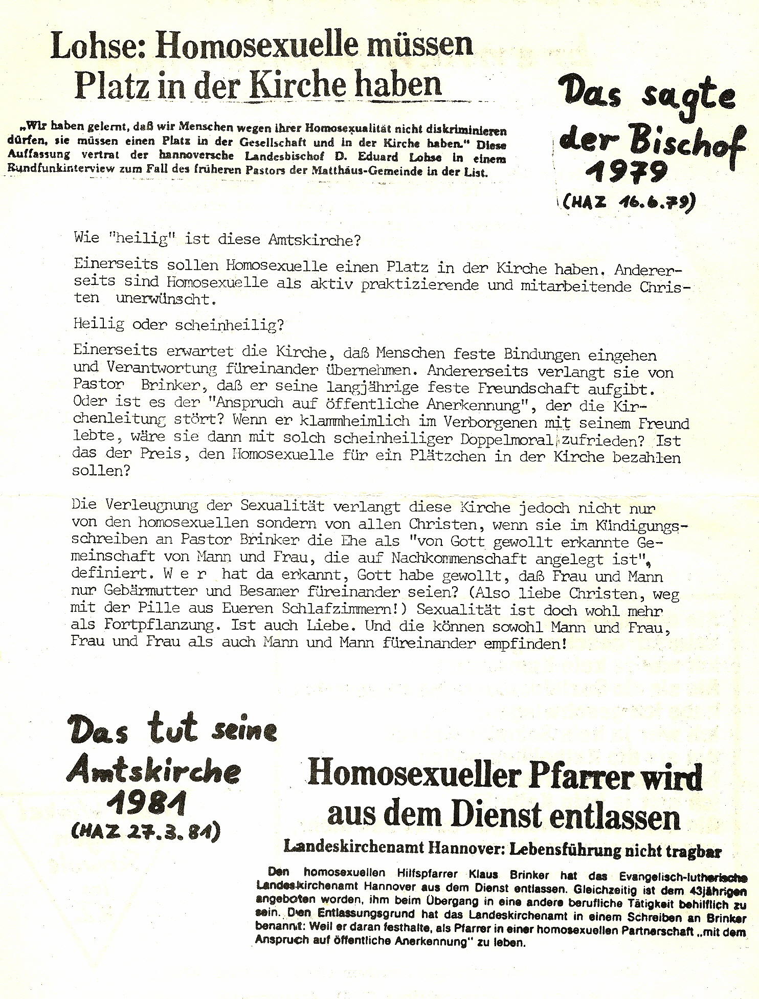 Flugblatt vom April 1981 von der homosexuellen Aktionsgruppe Hannovers schwuler Haufen (auch: Homosexuelle Studenten Hannover. HSH) mit Zeitungsausschnitten der Hannoverschen Allgemeinen Zeitung hinsichtlich einer Erklärung von Bischof Eduard Lohse Stellung und zum Platz von Homosexuellen in der Kirche; sowie ein Ausschnitt zur Entlassung von Hans-Jürgen Meyer aus dem kirchlichen Gottesdienst; dazwischen Stellungnnahmen der HSH, hier vertreten durch die Aktivisten Rainer Hoffschildt und Elmar Drost.